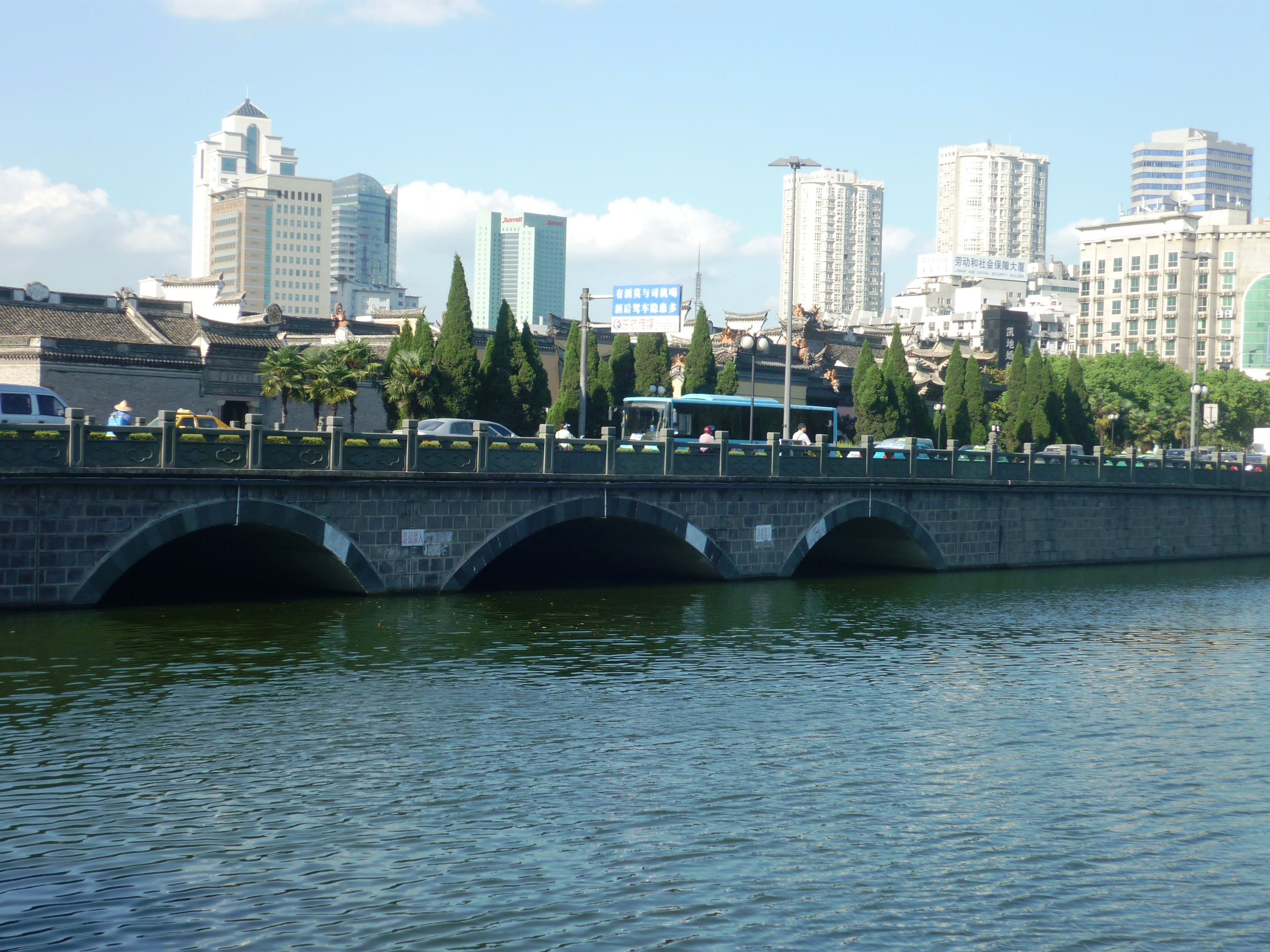 宁波柳汀街